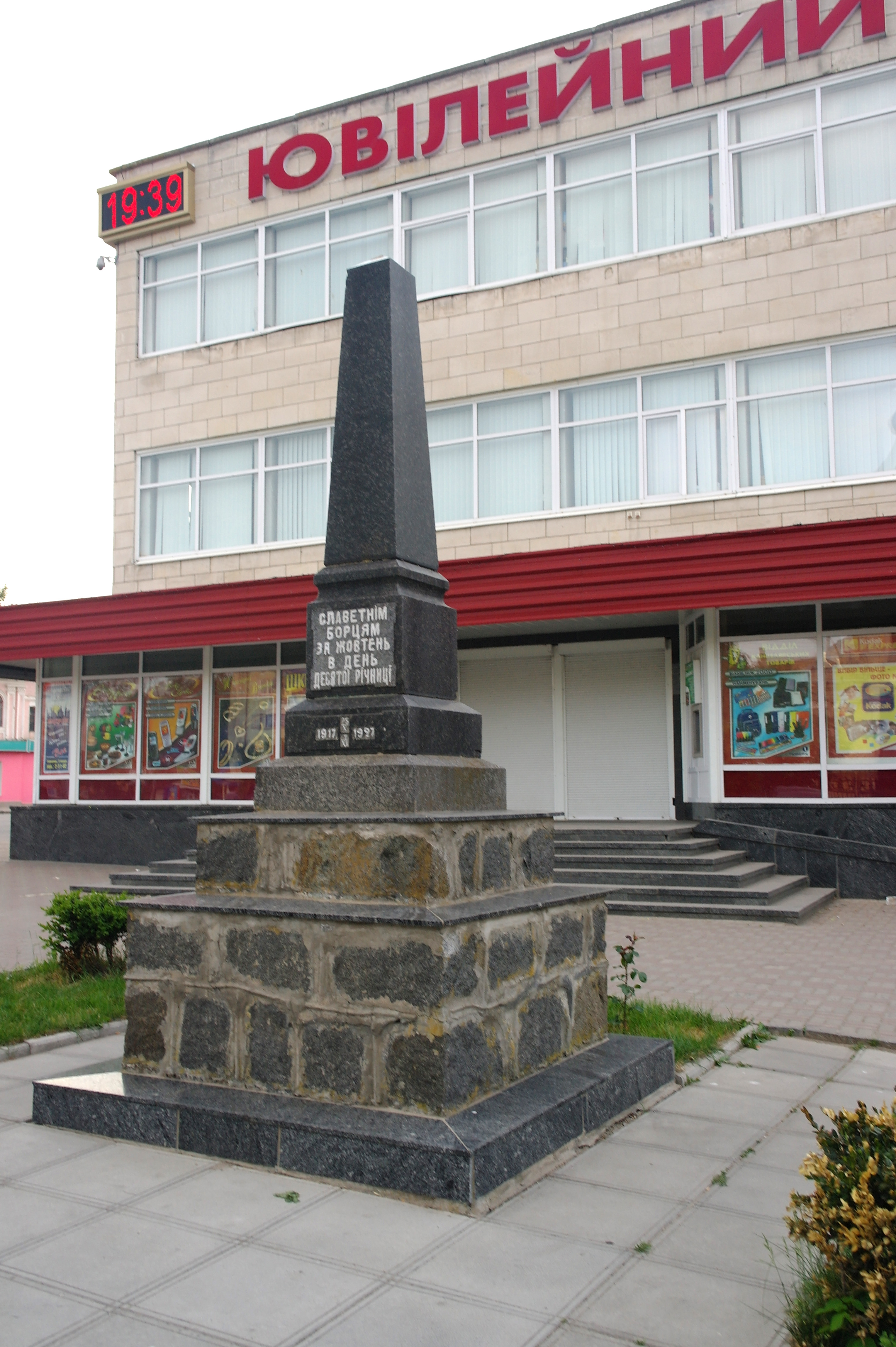 Бердичів, Братська могила учасників громадянської війни